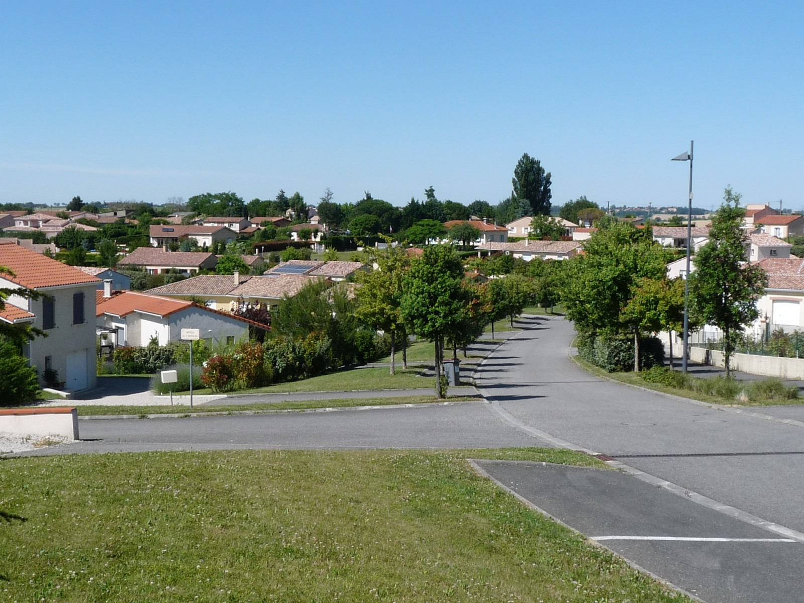 Chemin d'en Burgade, Préserville, Haute-Garonne, France